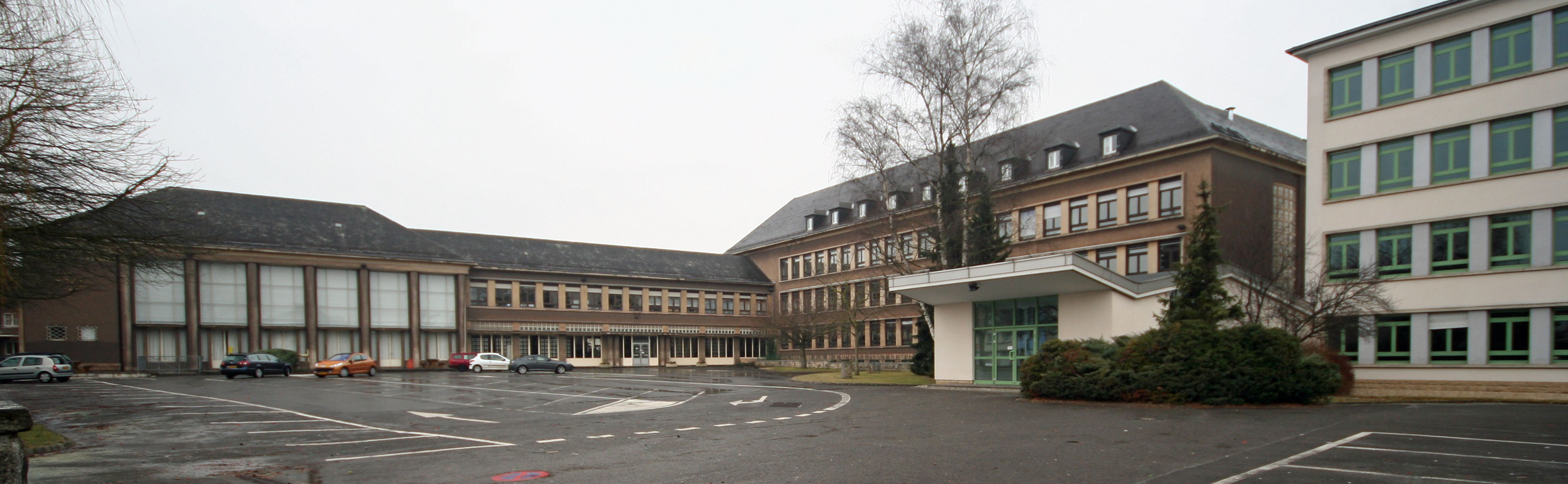 Lycée Hubert Clément Esch.